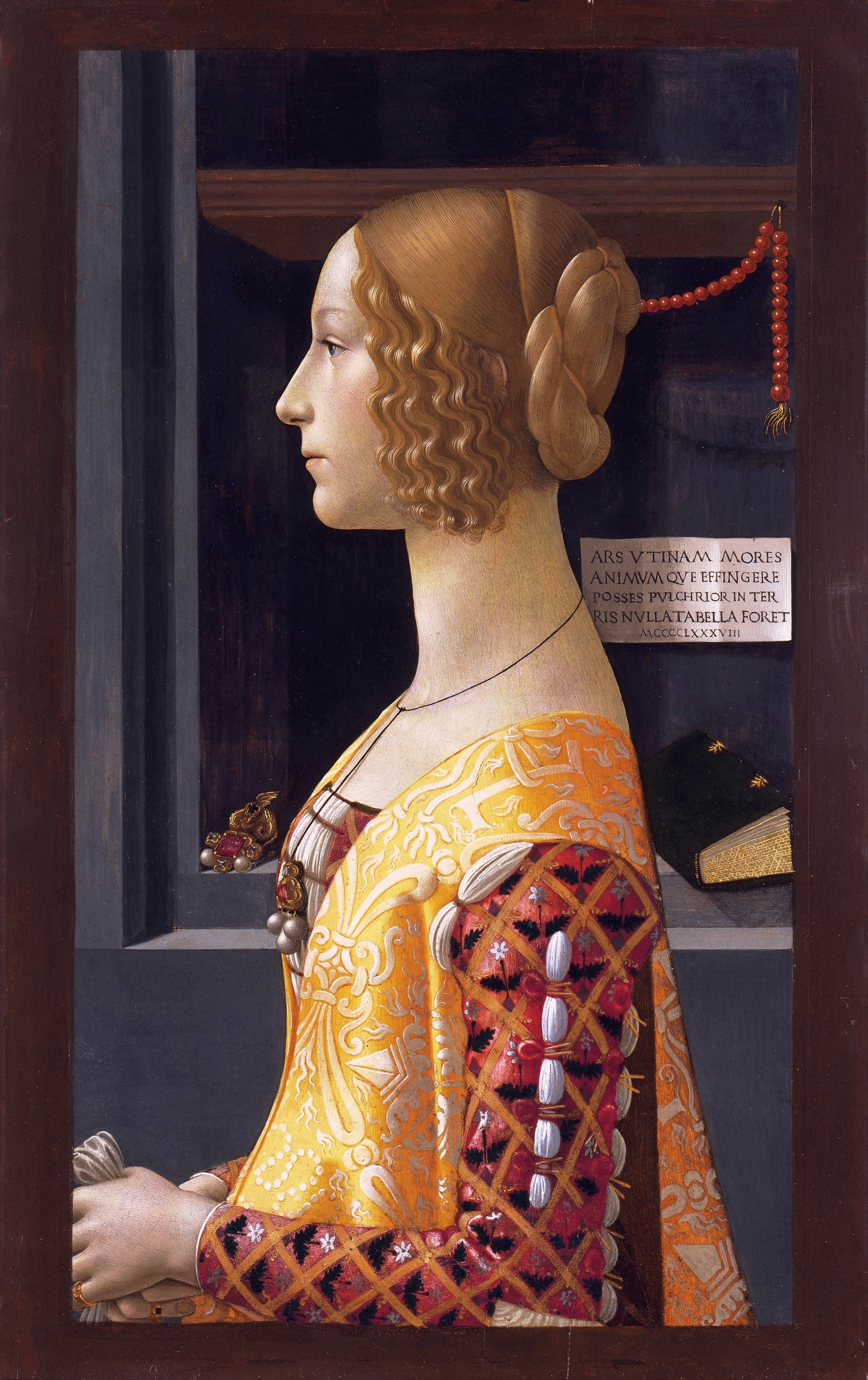 Depicted person: Giovanna Tornabuoni